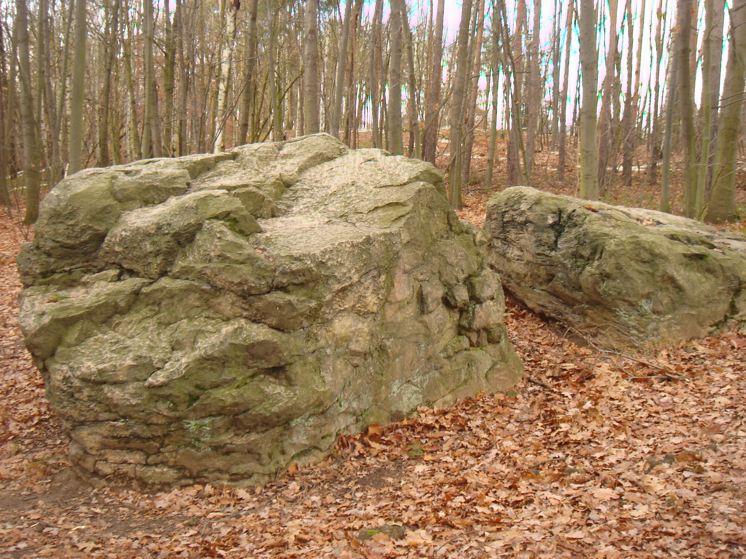 Die Oltersteine nahe der Autobahnanschlussstelle Dresden-Hellerau